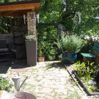 ZUM Ostausgang